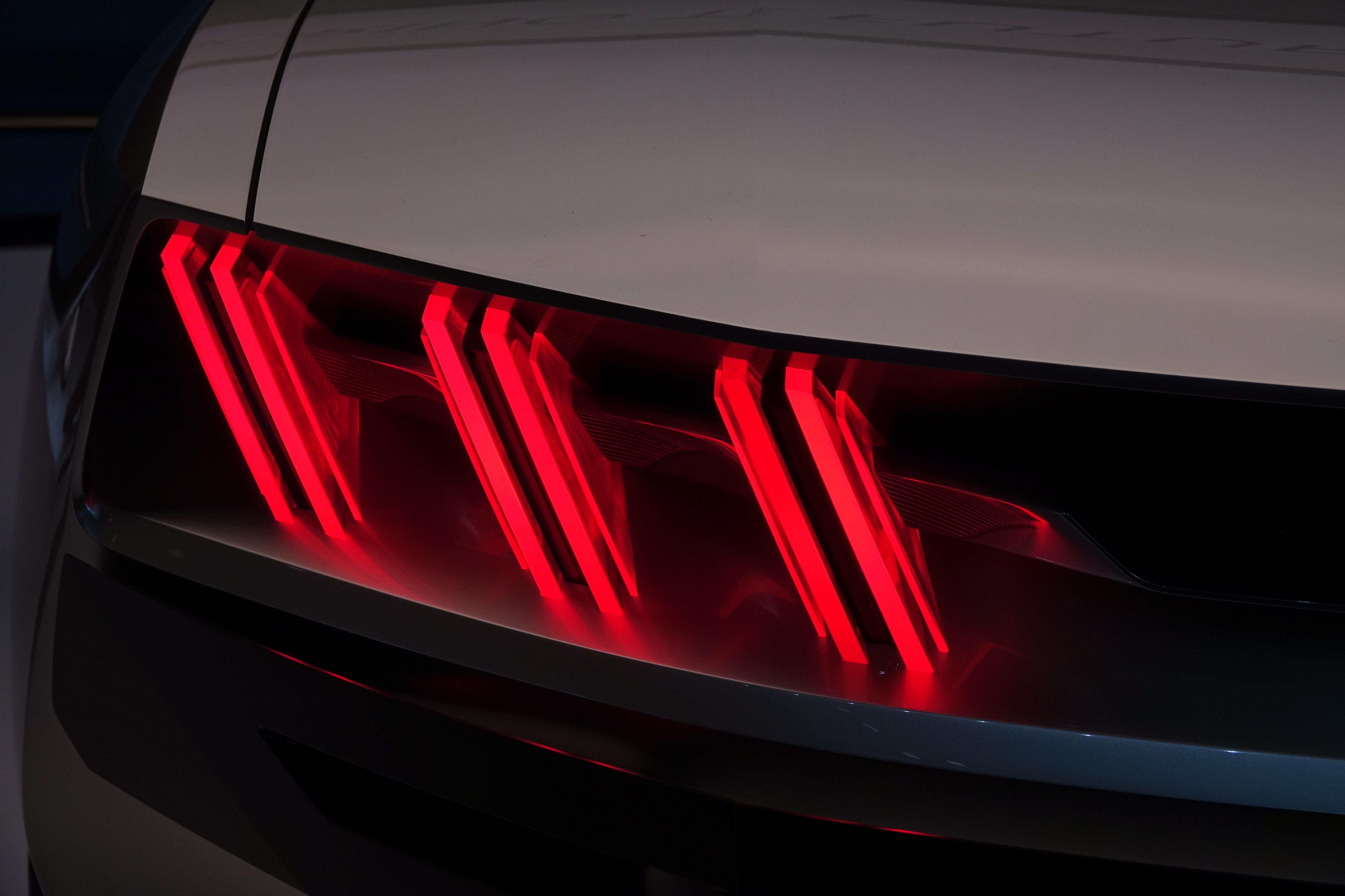 Peugeot e-Legend-Mondial de l'Auto 2018